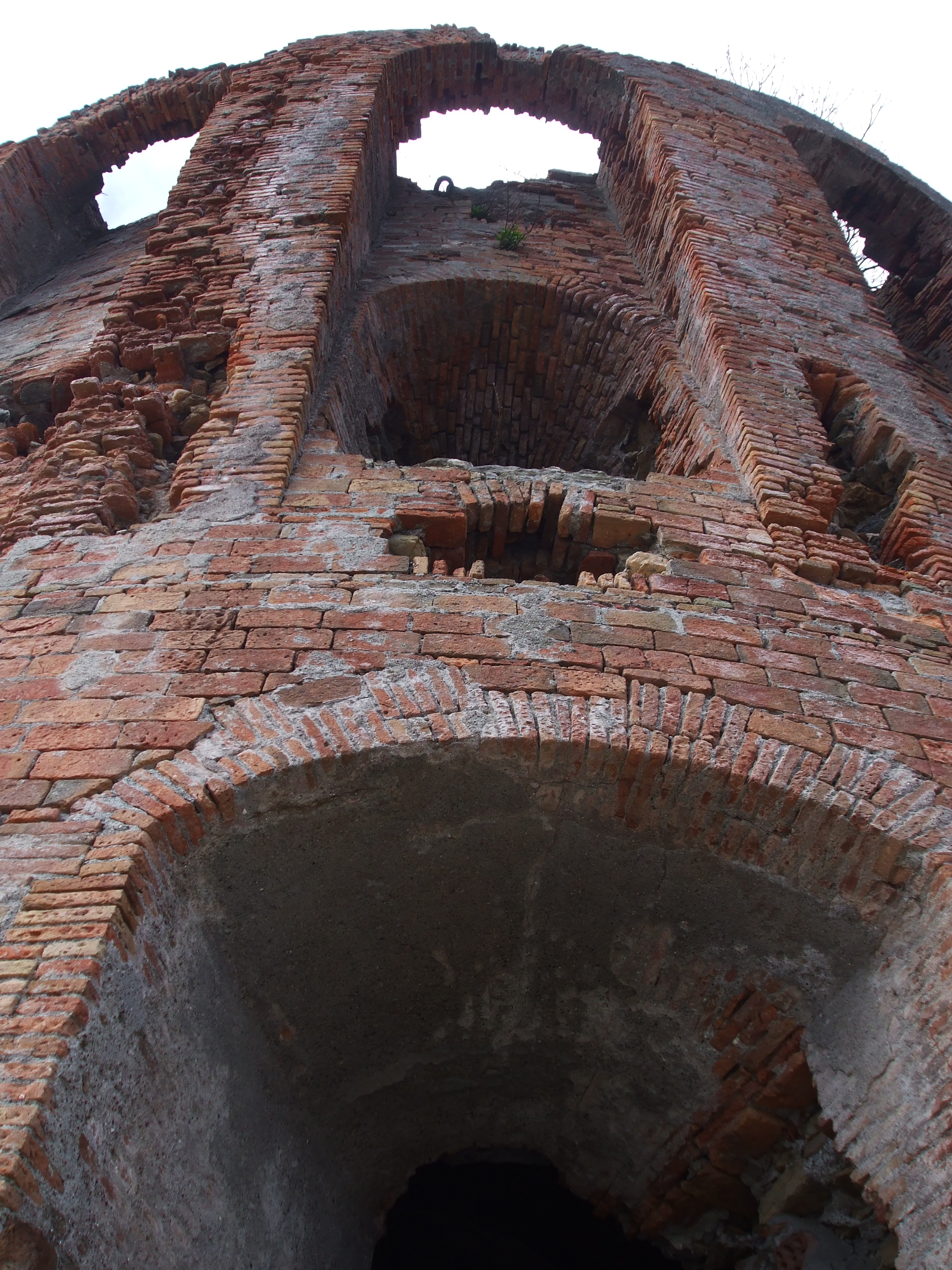 Forte Quezzi, situato sulle alture dell'omonimo quartiere di Genova